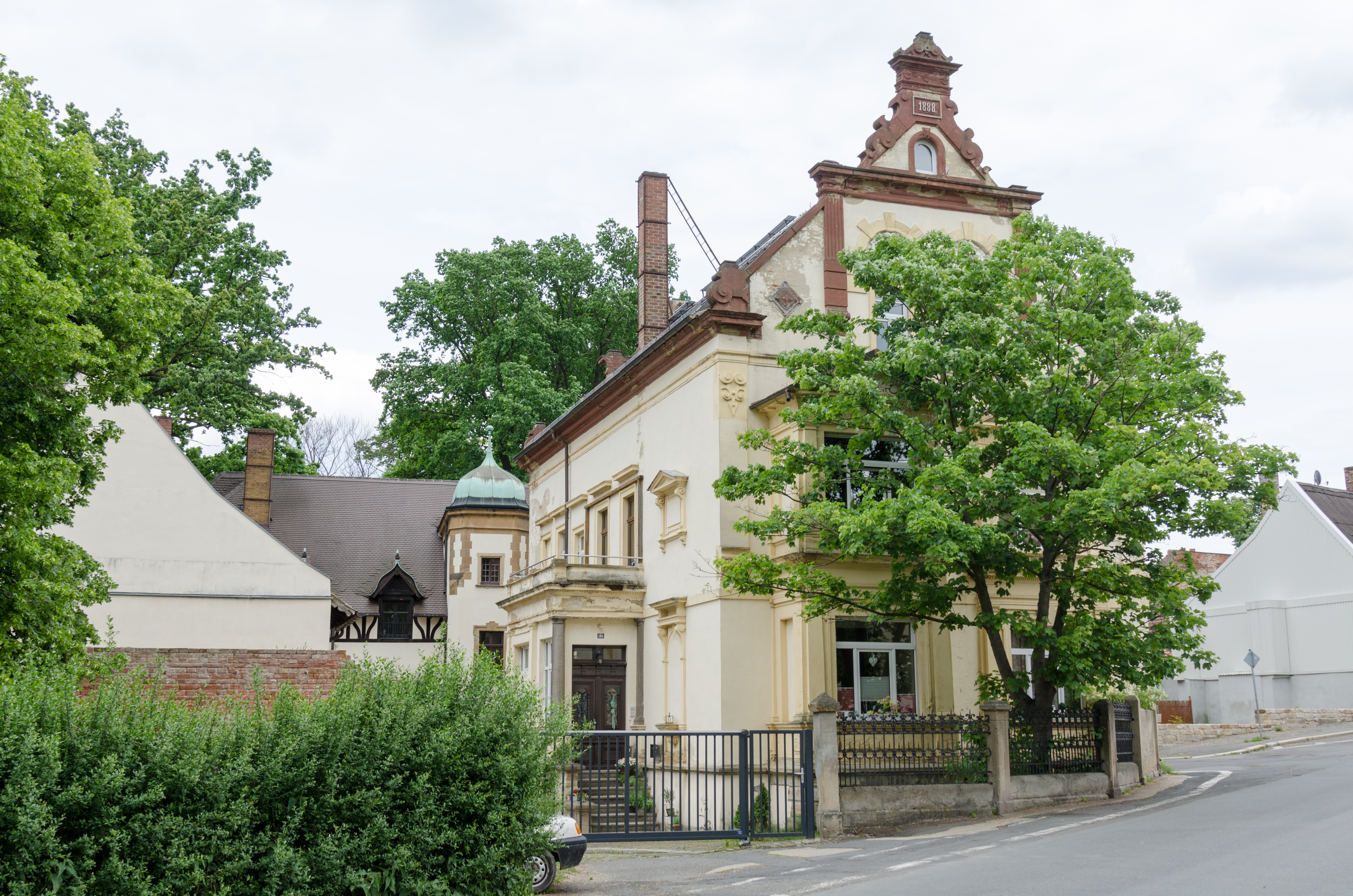 Zeitz, Stephanstraße 18